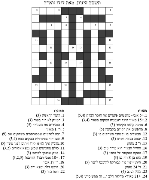 תשבץ היגיון מאת דודו זוארץ ובאישורו